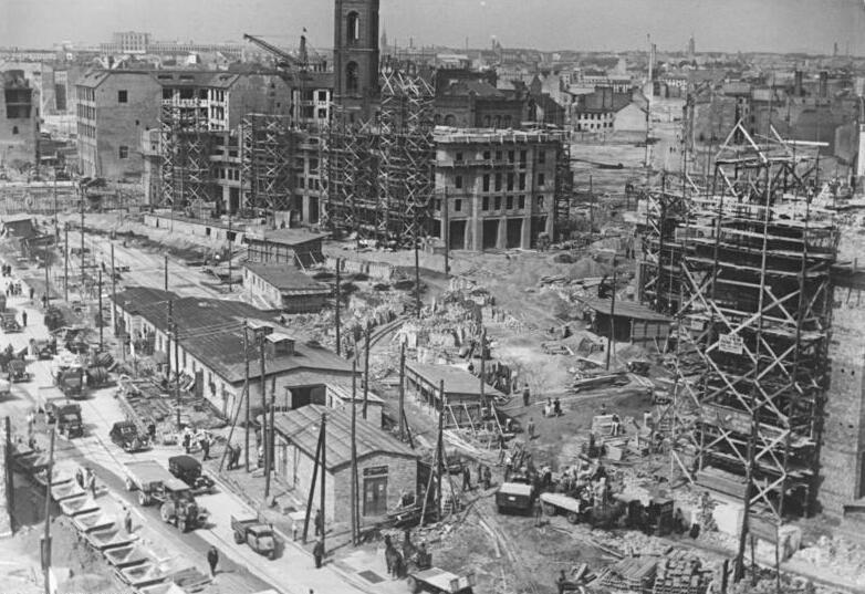 Zentralbild Krüger 18.8.52 Nationales Aufbauprogramm Berlin 1952 UBz: Blick auf den Strausberger Platz.